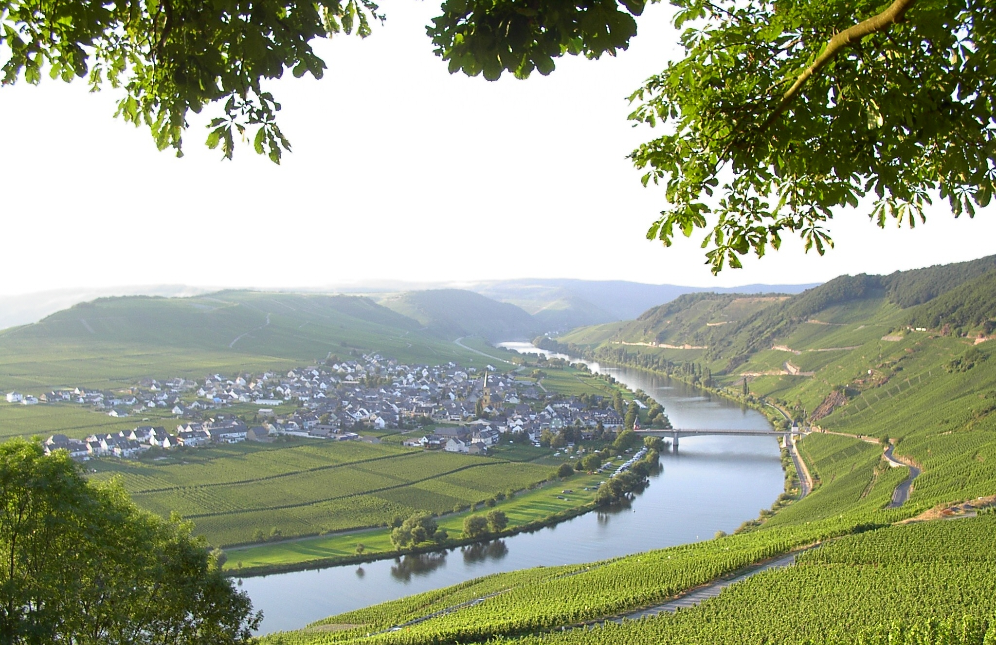 Moselschleife bei Trittenheim (selbst fotografiert)